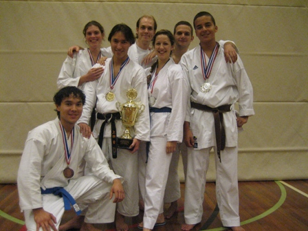 Foto genomen door Max Müller op Nationale Kampioenschappen Shotokan Karate te Maastricht, 8 oktober 2006. Maker is tevens voorzitter van SKVM Kinran.